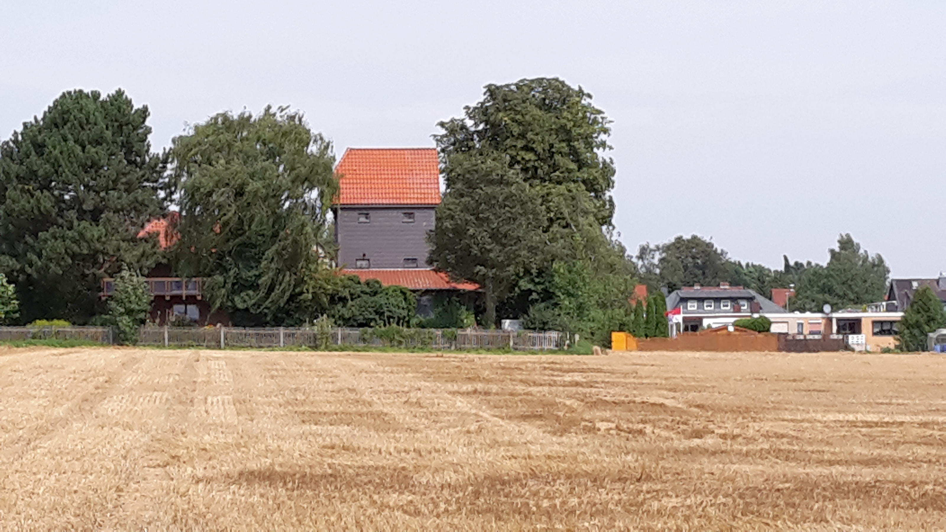 Evangelische Kirche Sauingen, Salzgitter, Niedersachsen, Deutschland.